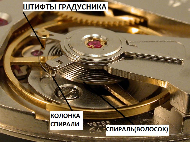 Это - спираль баланса, необходимый элемент механизма механических часов